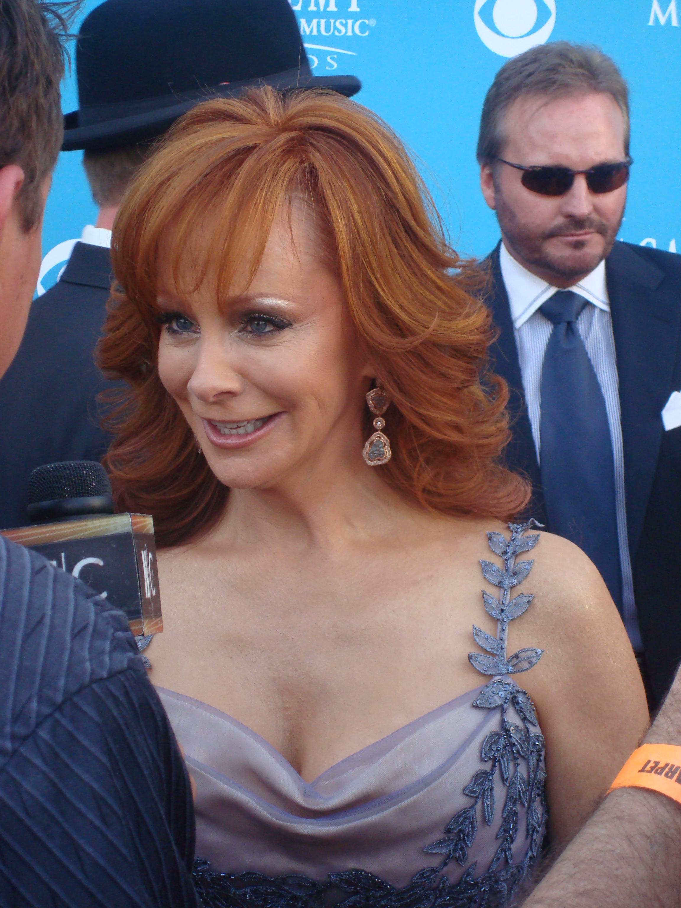 Reba McEntire